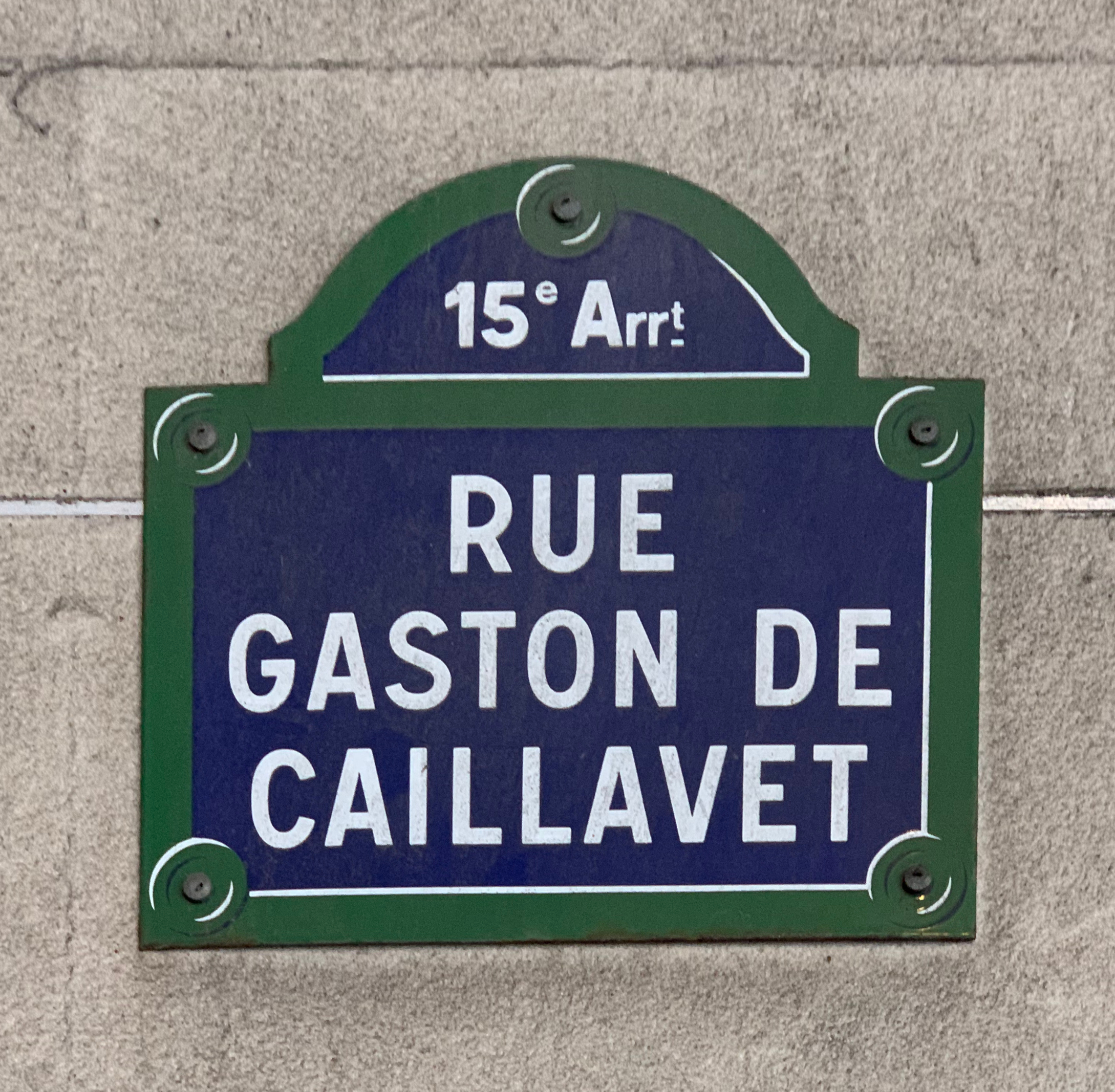 Rue Gaston de Caillavet (Paris), février 2020.